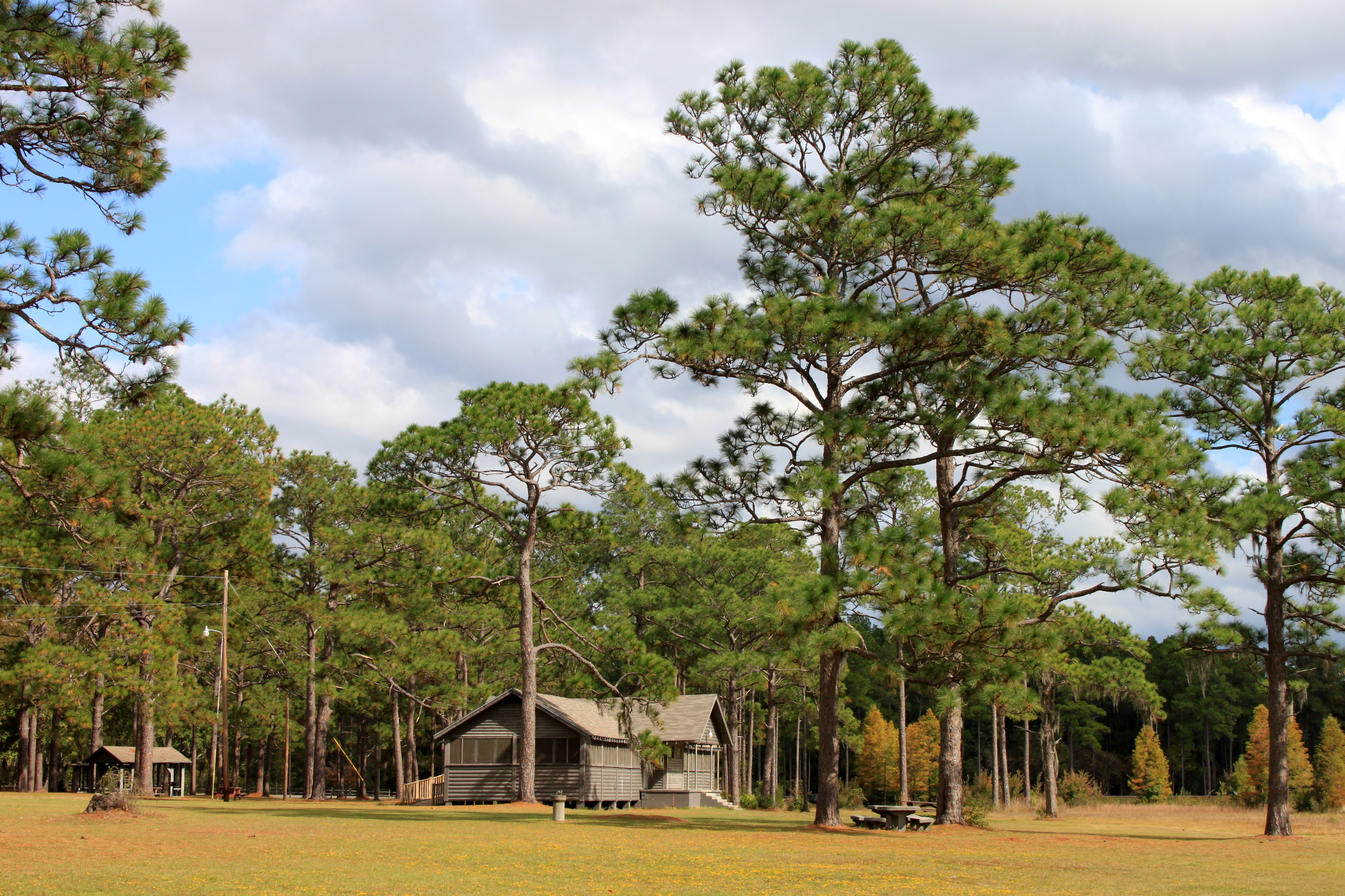 Laura S Walker State Park